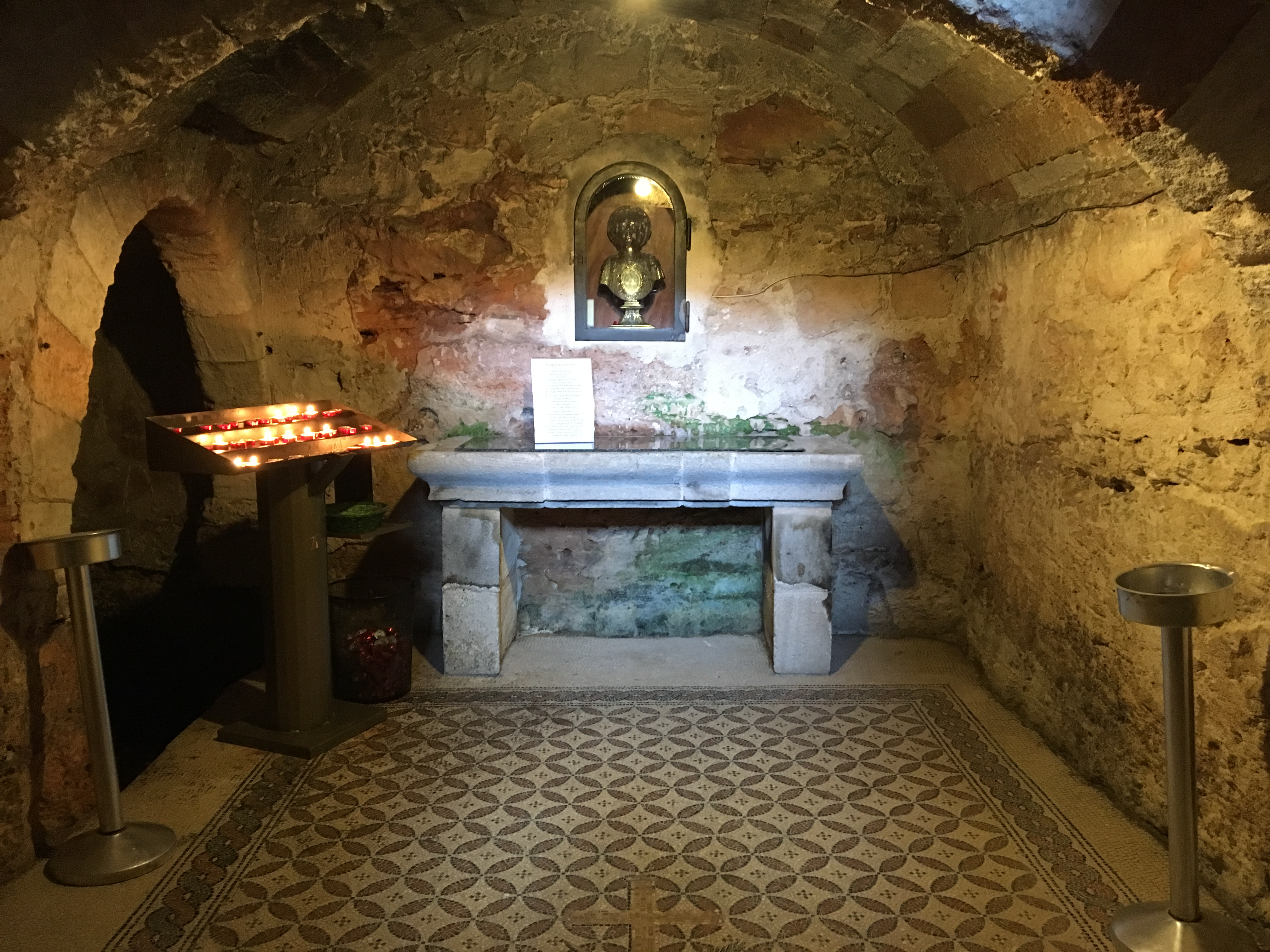 Interno della Cripta dell'santuario